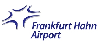 Ehemaliges Logo des Flughafens Frankfurt-Hahn bis 2010